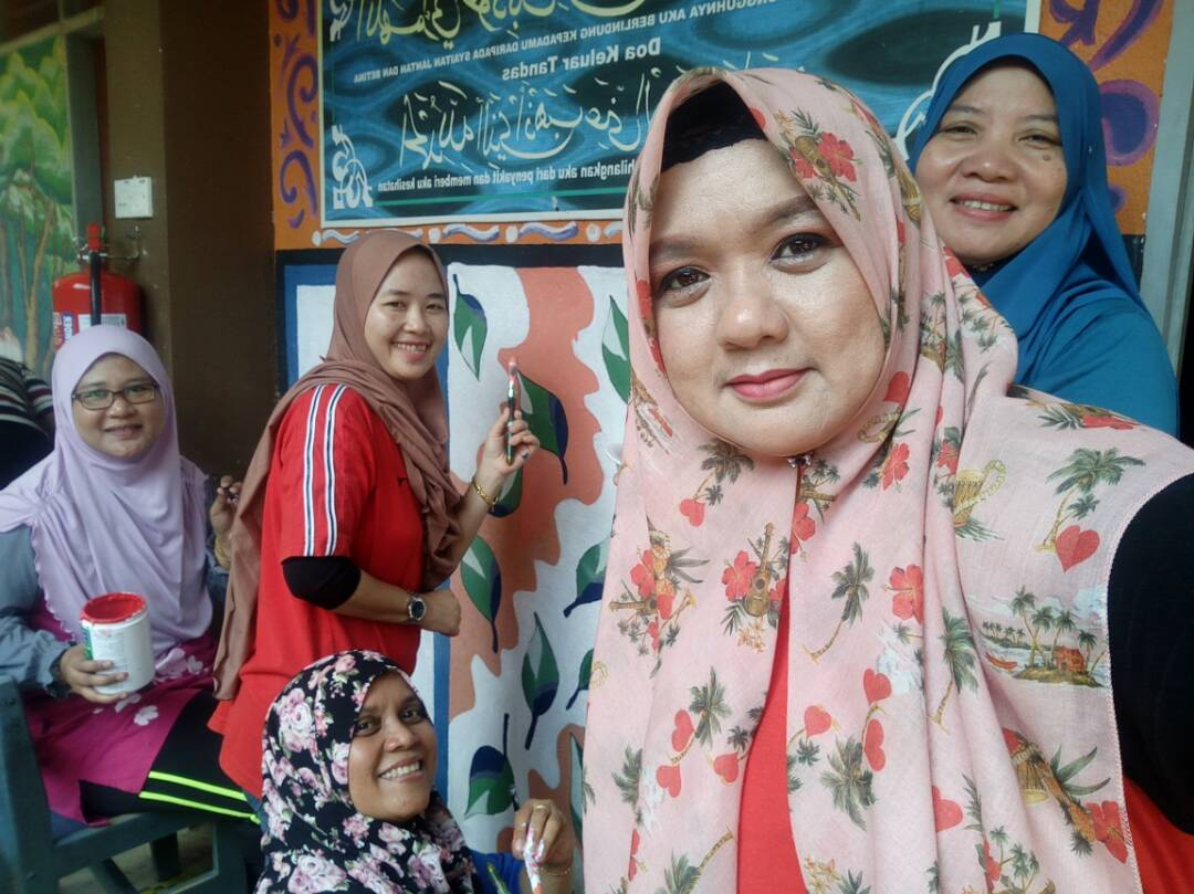 Masa Berswafoto..!